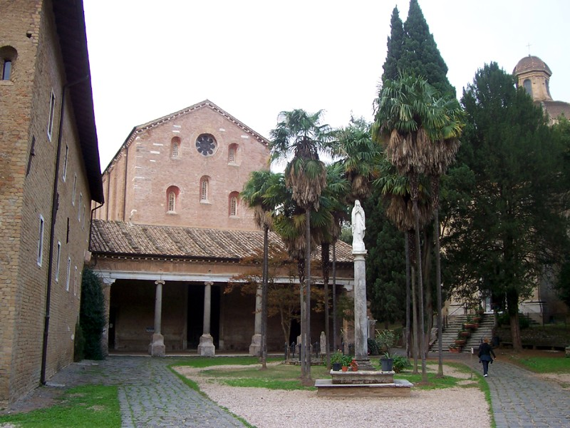 Roma - Chiesa abbaziale dei Ss. Vincenzo e Anastasio alle Tre Fontane